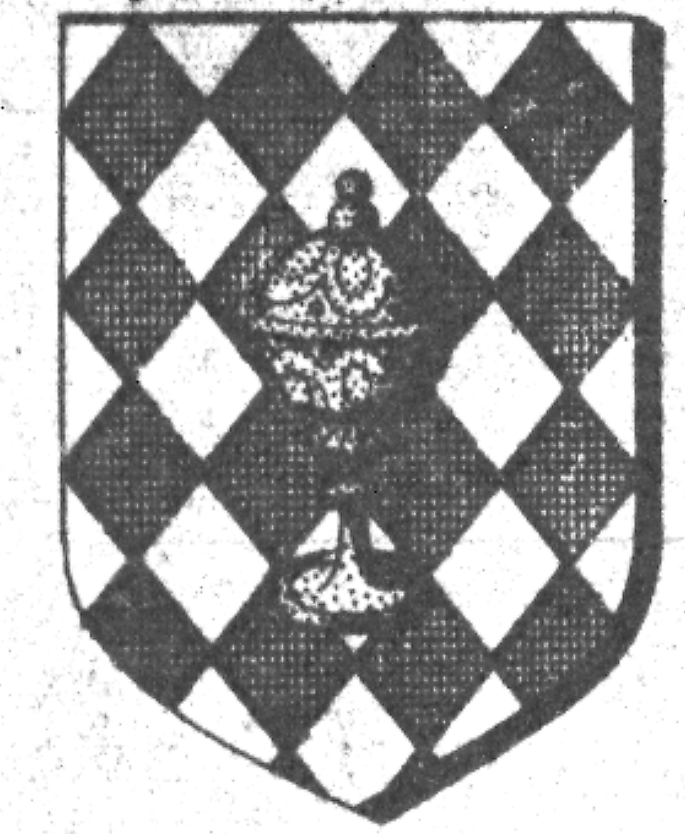 blason omnes